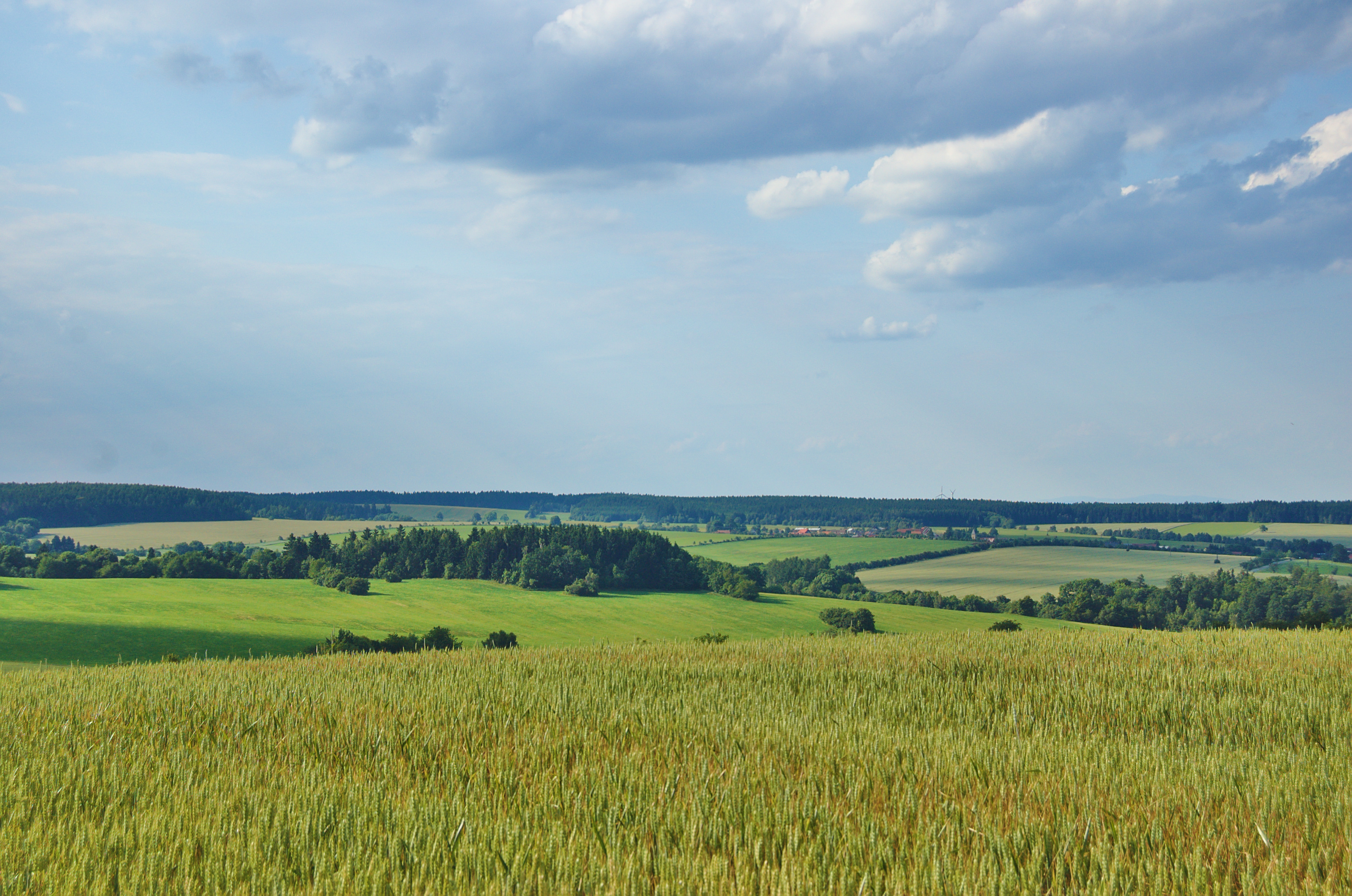 Pohled na Bukovou, Protivanov, okres Prostějov